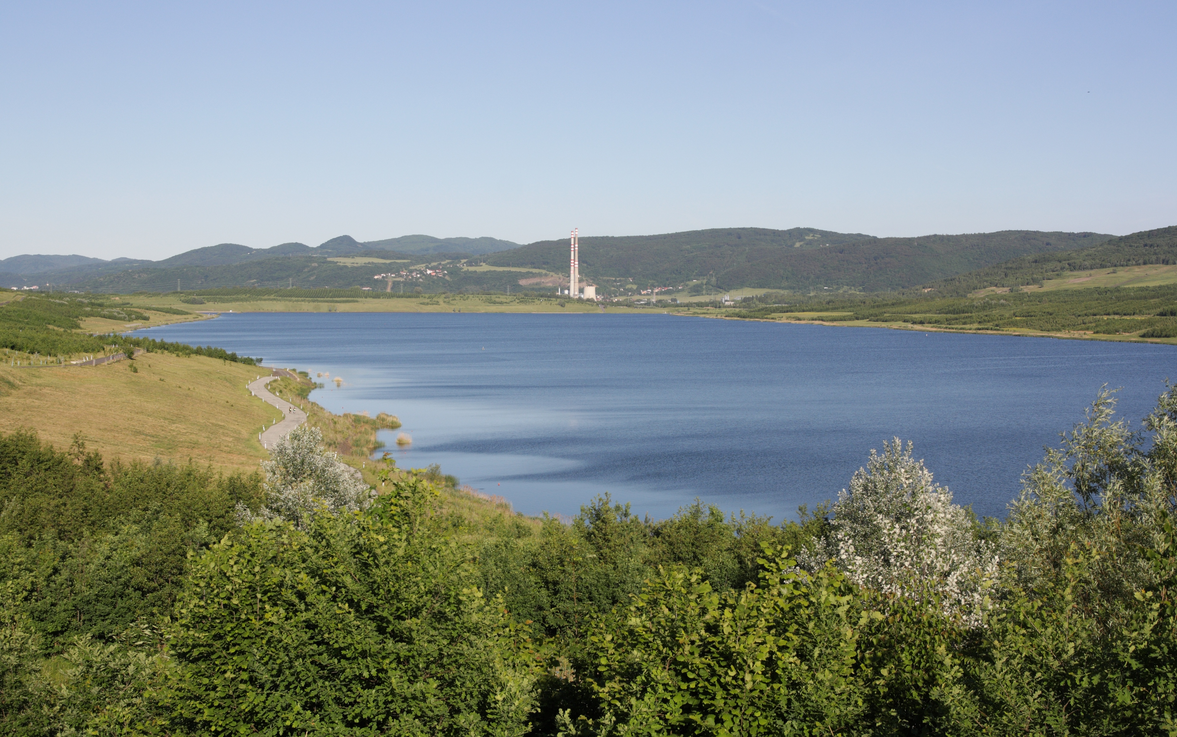 Jezero Milada - pohled od SZ